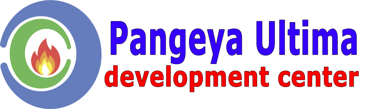 Обновлене лого організації із 2018